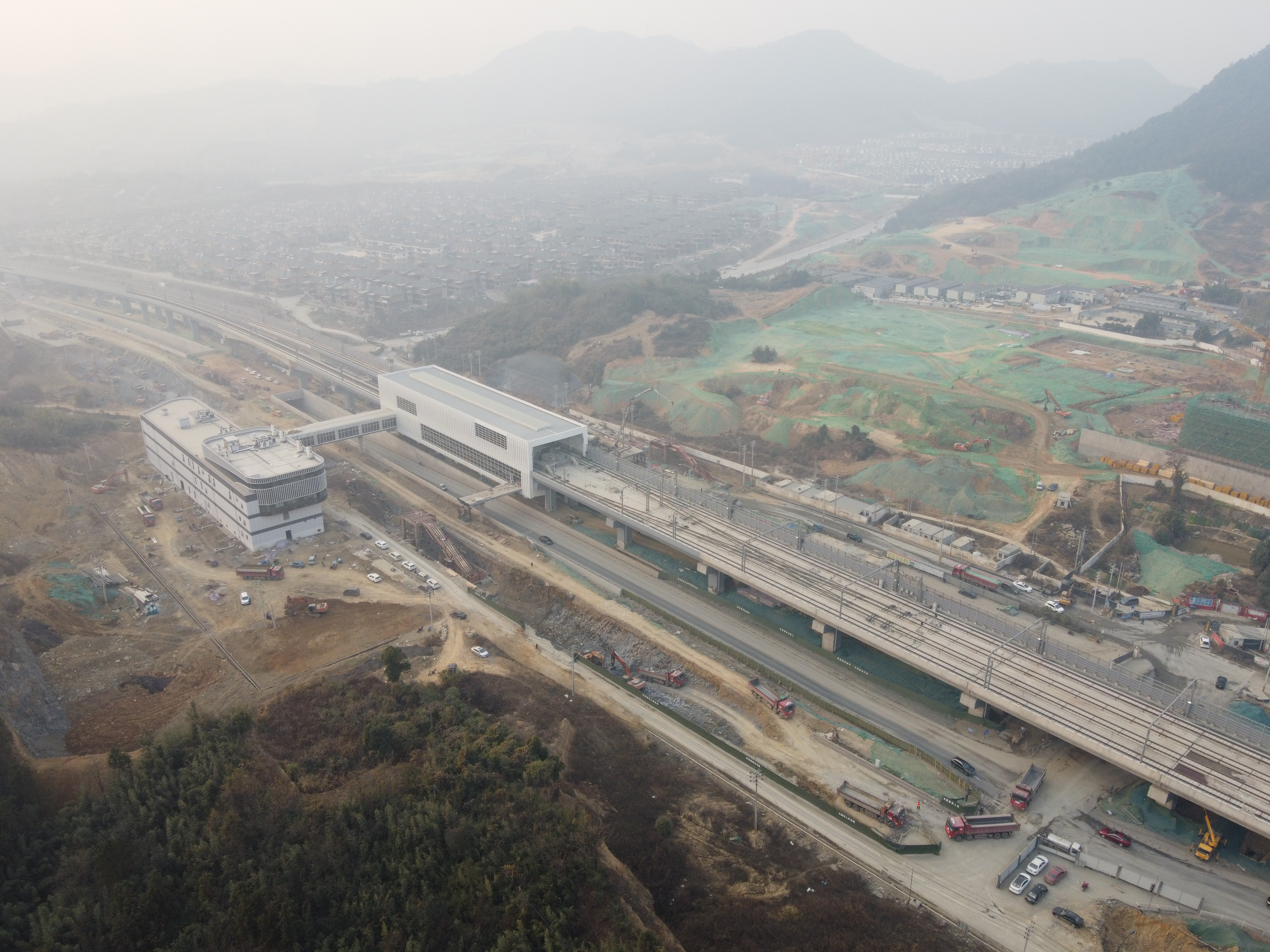 八百里站站房